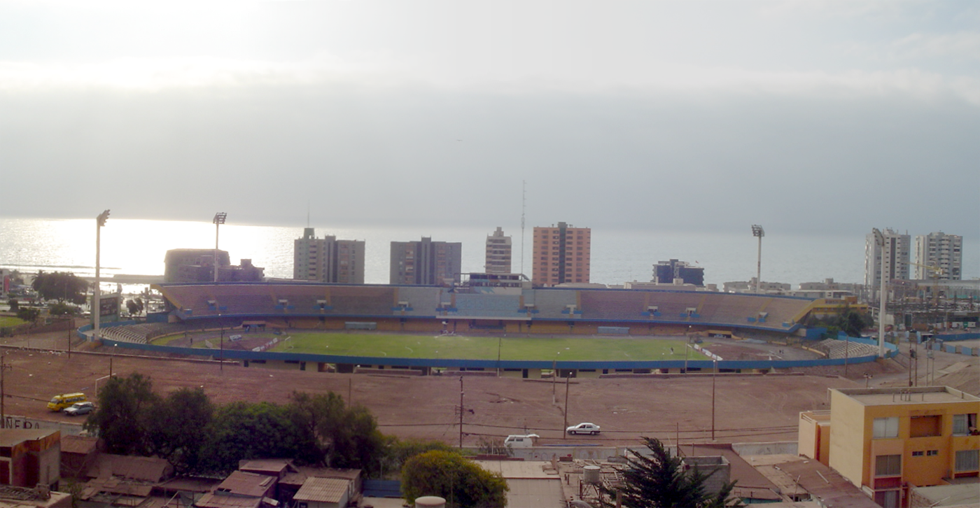 Estadio Regional Calvo y Bascuñán antes de su remodelación.